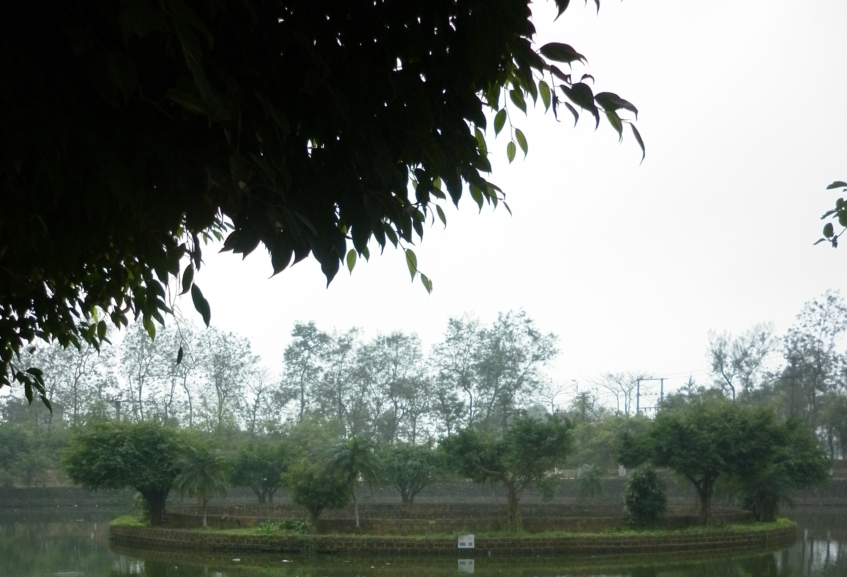 Giếng Trọng Thủy hay còn gọi là Giếng Ngọc tại xã Cổ Loa, huyện Đông Anh, Hà Nội. Tương truyền Trọng Thủy đã nhảy xuống giếng này mà chết.